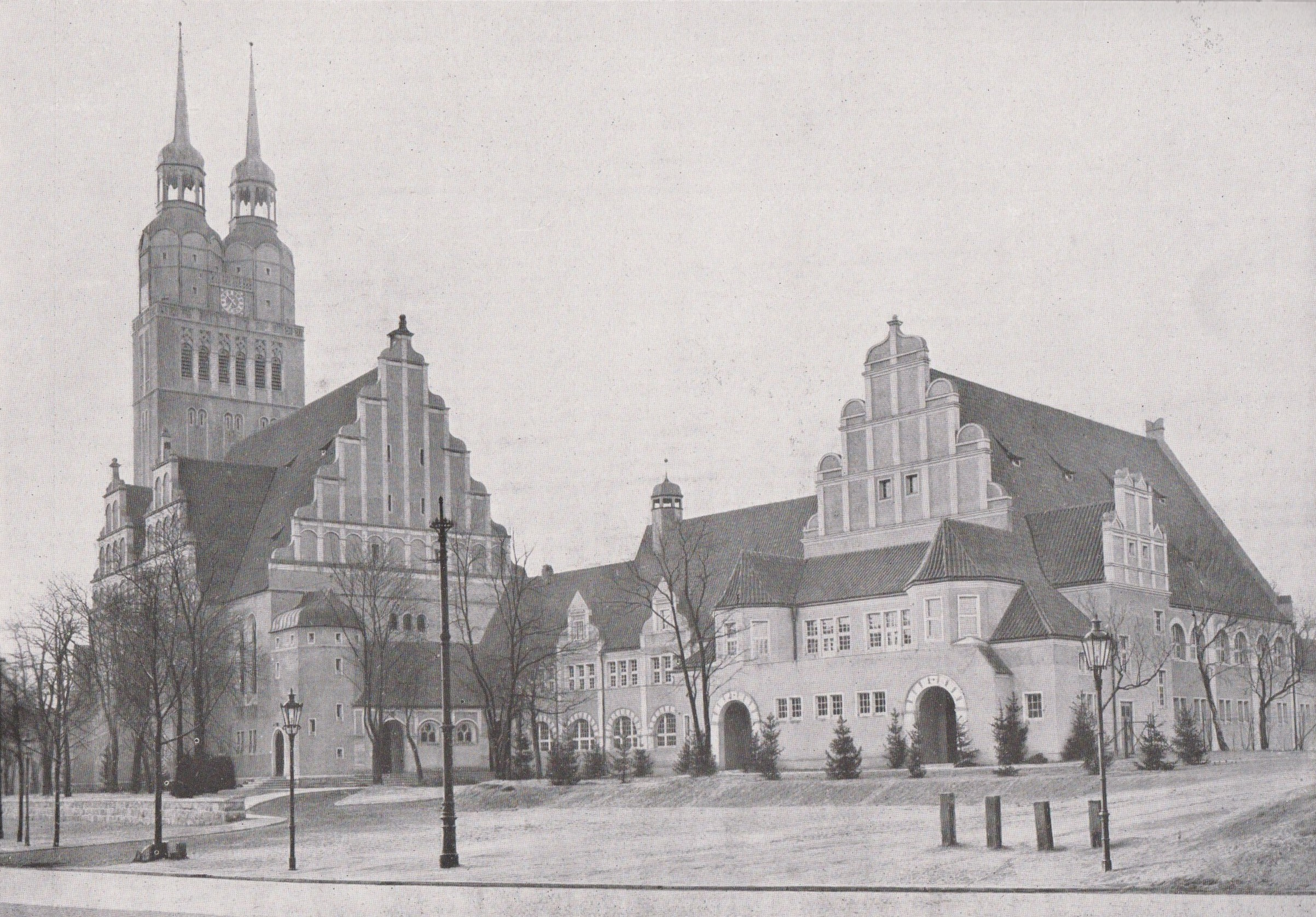 Pauluskirche in Breslau mit Pfarrhaus 1926, 1945 zerstört